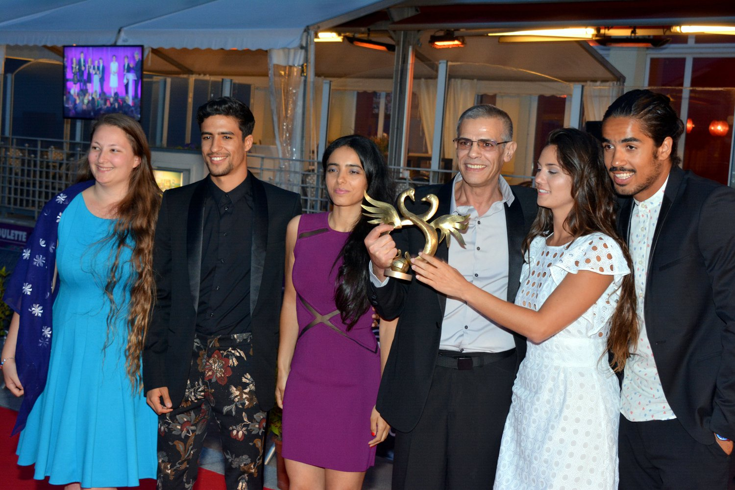 L'équipe du film Mektoub my love au festival du film de Cabourg